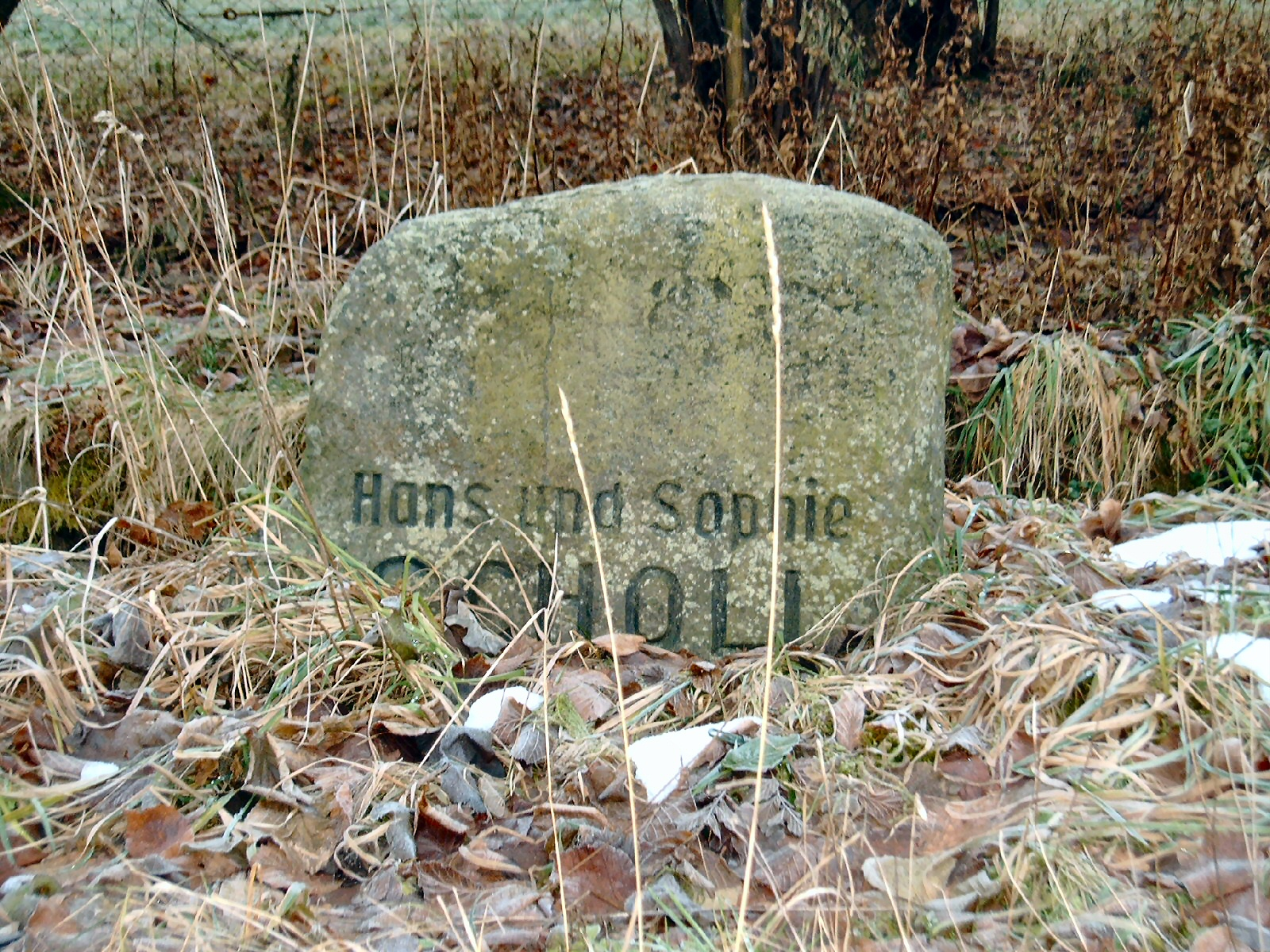 Gedenkstein der Geschwister Scholl der ehemaligen Berufsschule gleichen Namens